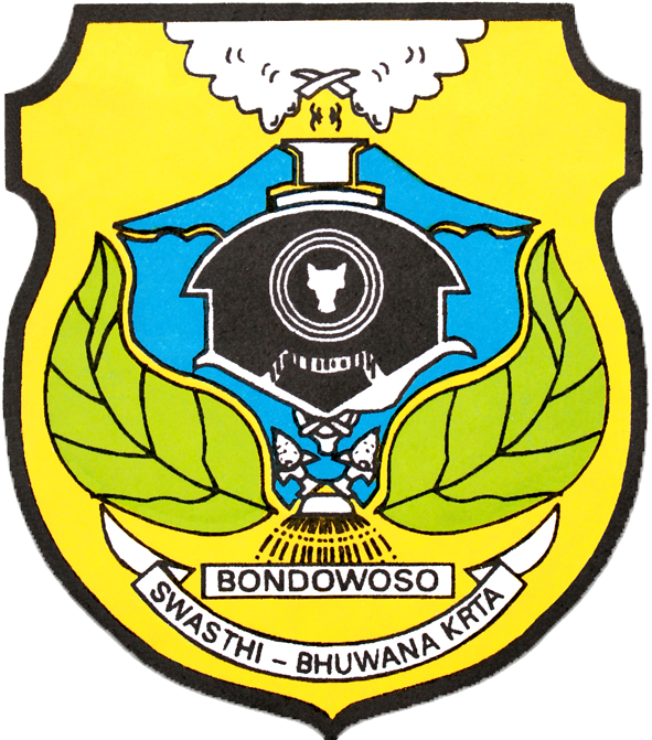 Lambang Daerah Kabupaten Bondowoso, Jawa Timur